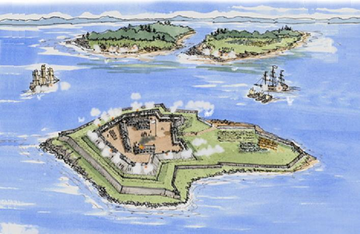 Fort Lévis, dessin crayon réalisée en 1759.